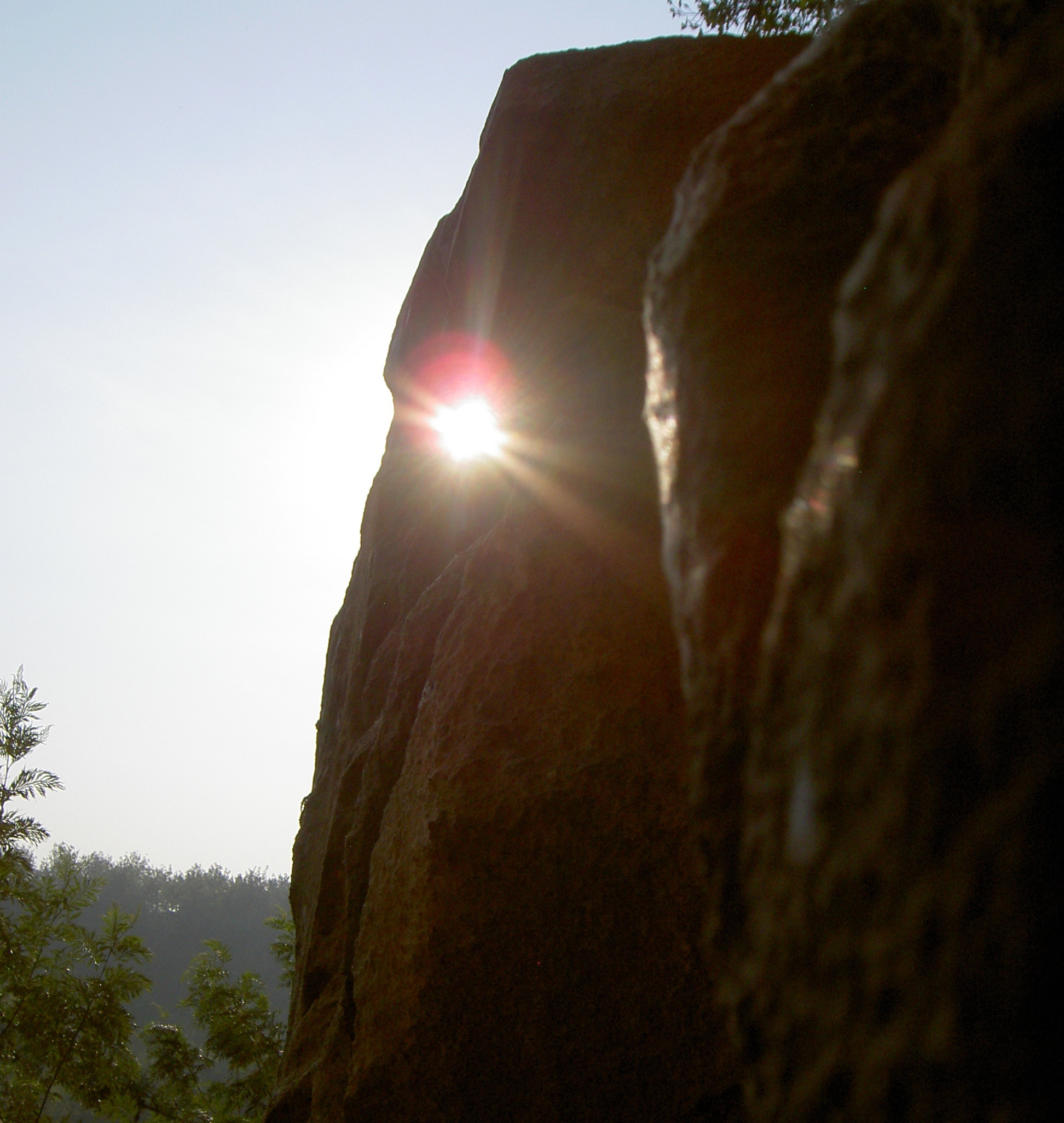 Se ve la luz que pasa por orificio en la roca, foto tomada a las 7 am